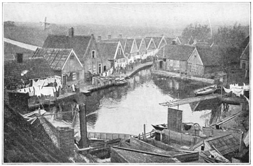 Het dorp Volendam